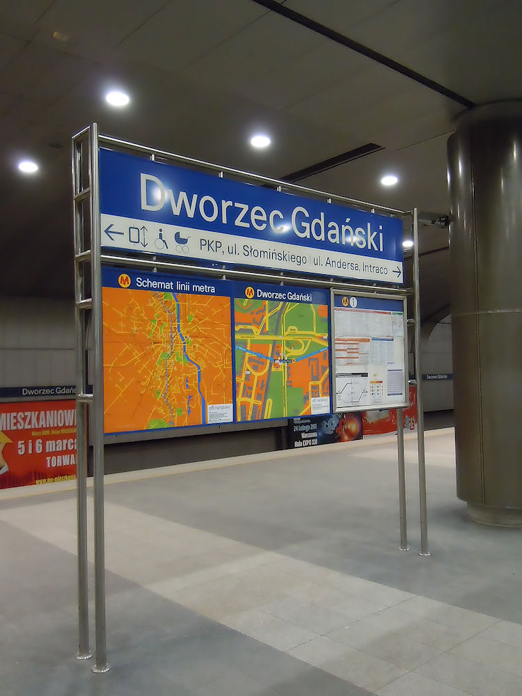 Station Dworzec Gdański